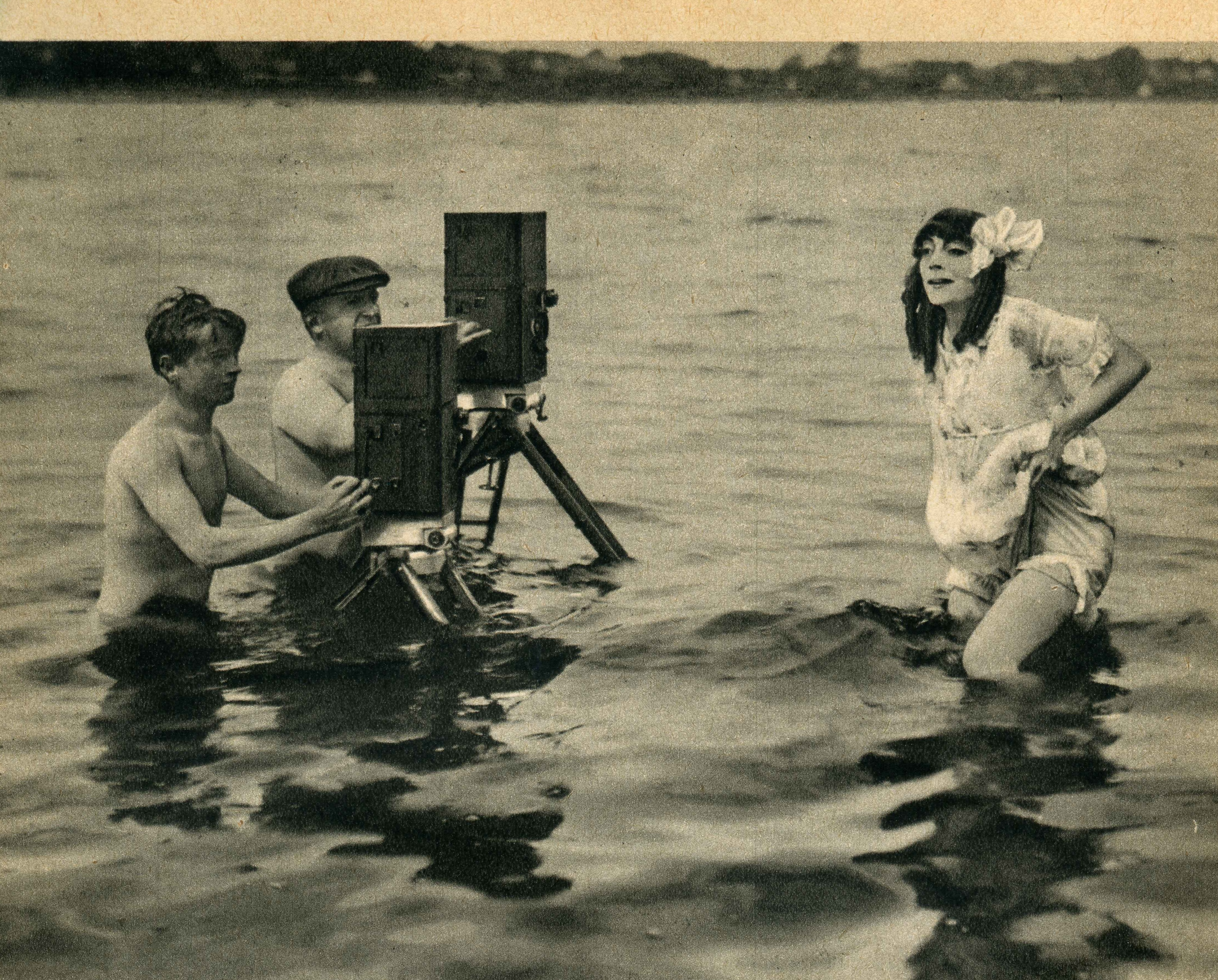 Dreharbeiten zu dem Film Engelein mit Asta Nielsen. Darstellerin und Kamerateam arbeiten im See. Sommer 1913